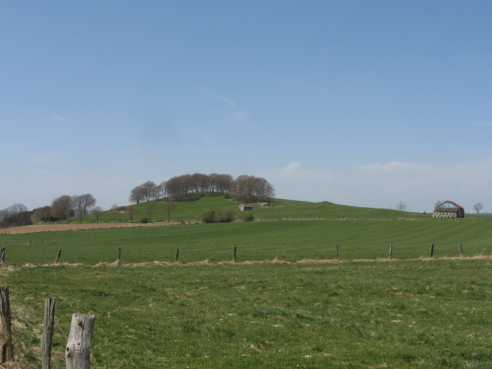 NSG Feldberg (Brilon, HSK 211) und NSG Königswiese; Brilon. NSG Feldberg ist die Bergkuppe und das flachere Grünland gehört zum NSG Königswiese.